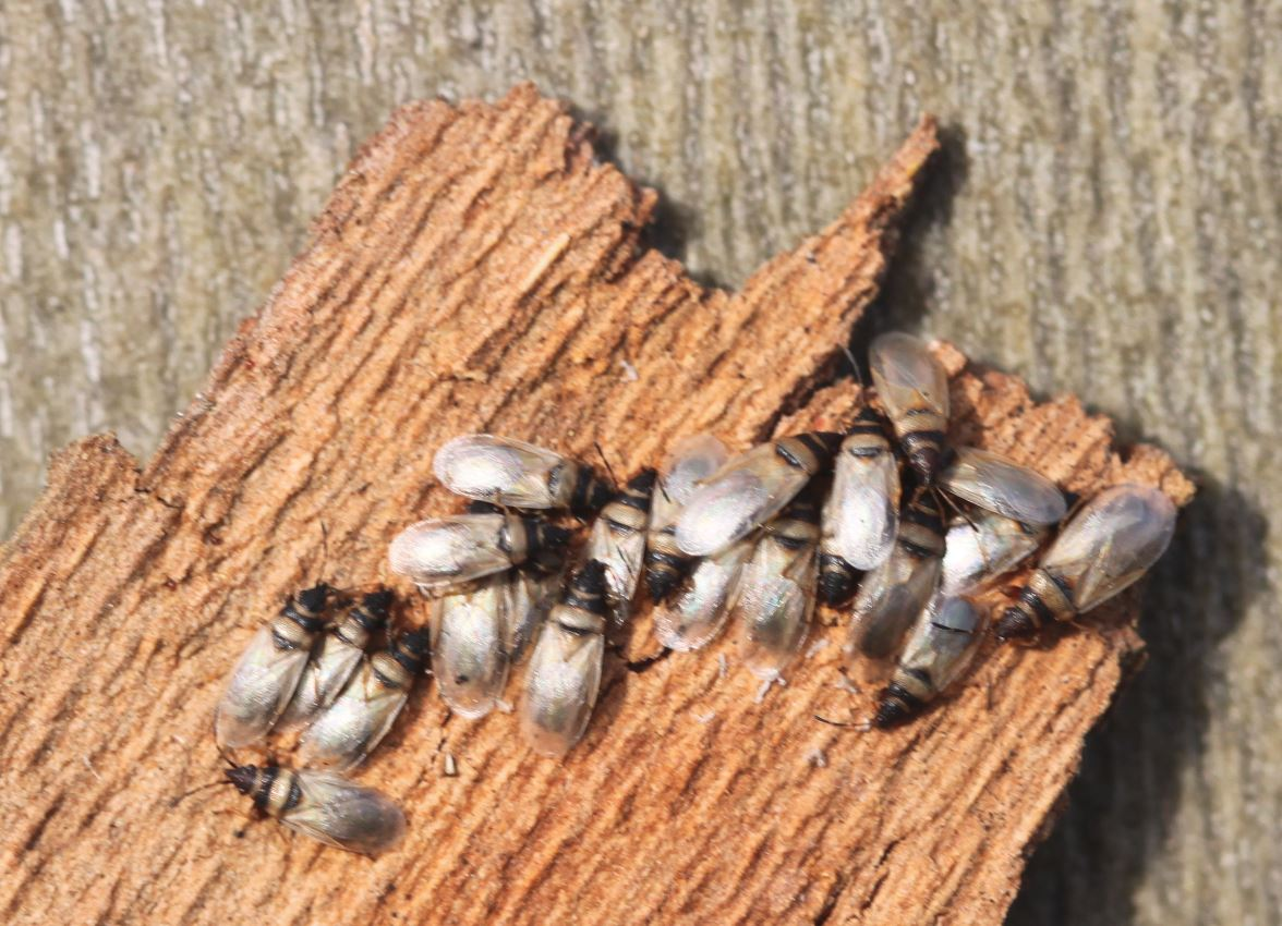 Überwinternde Wanzen der Art Oxycarenus pallens unter der Rinde einer Platane, am 17. Dezember 2019 in Walldorf/Baden